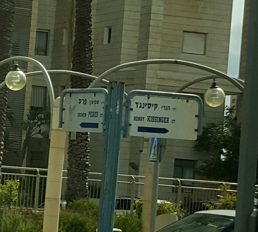 צומת הרחובות פרס וקיסינג'ר בראשון לציון